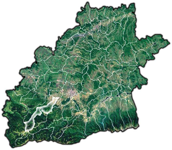 Gura Raului jud Sibiu.